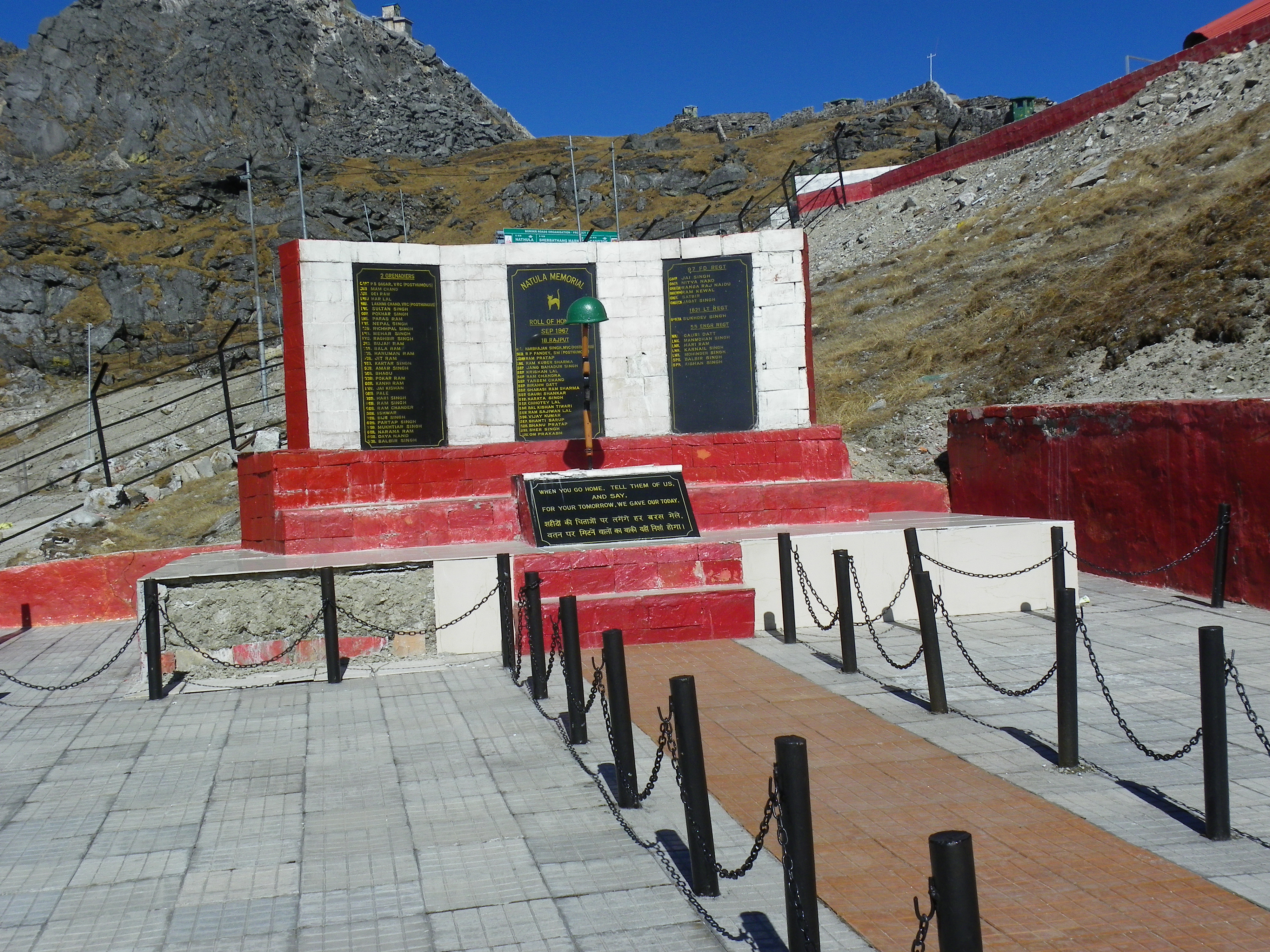 Smarak memorial